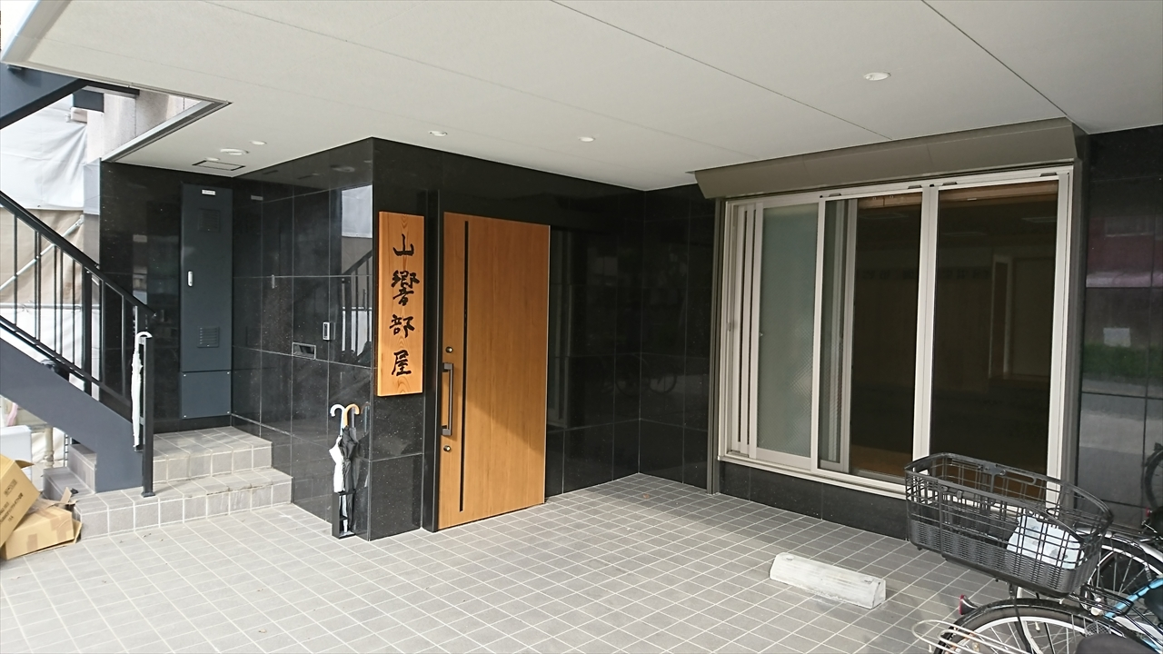 大相撲 山響部屋の正面玄関の写真。